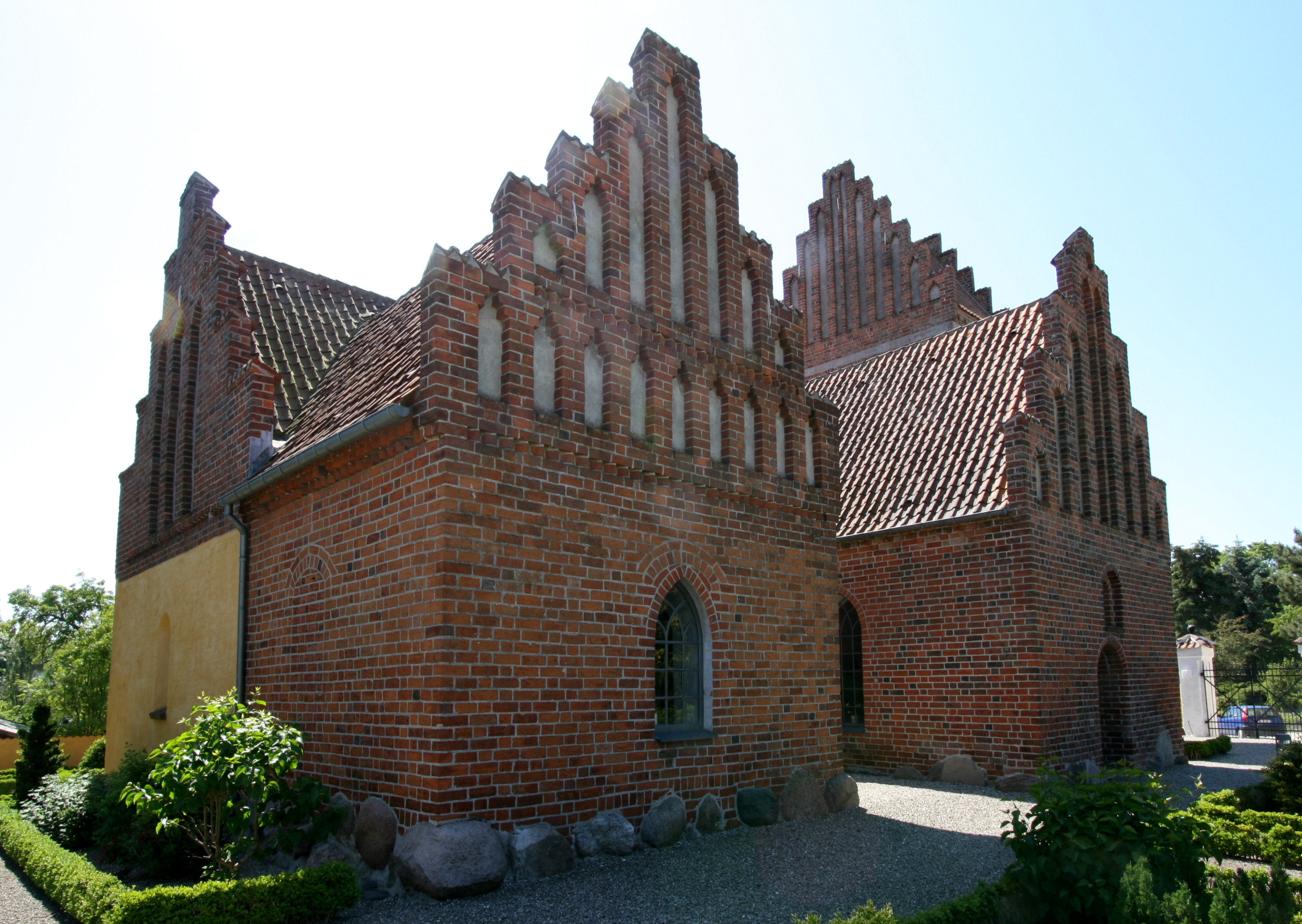 Ølsemagle Kirke, near Køge, Denmark. From northeast.